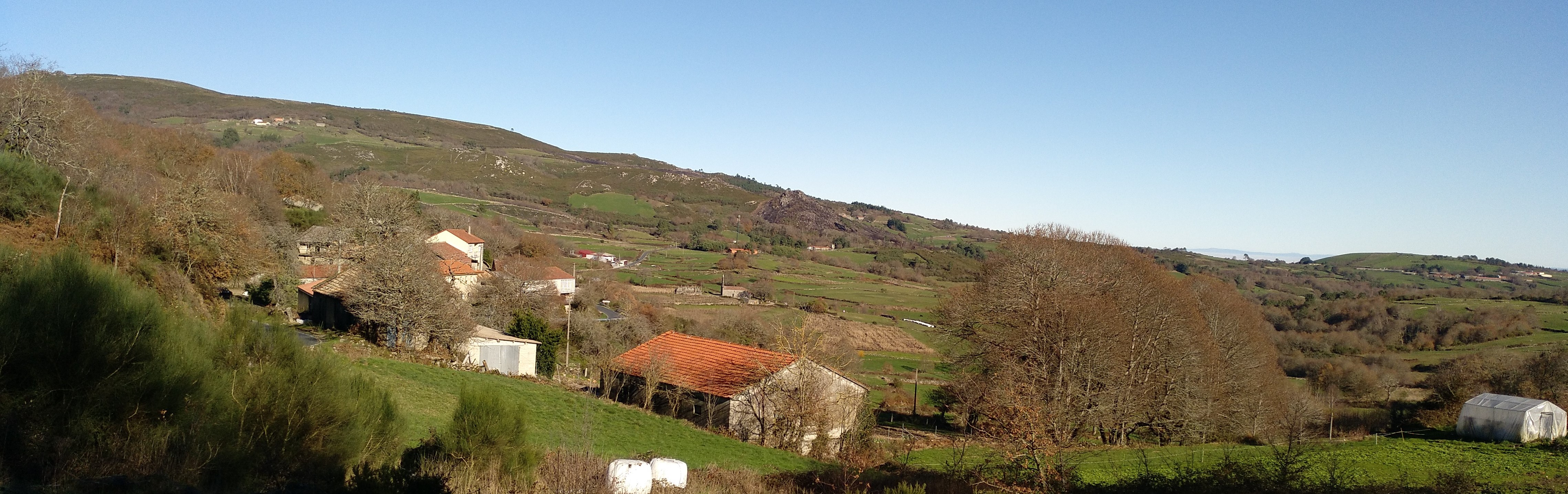 Parroquia da Vales (Cea, Ourense) vista desde o lugar de Agrosantiño